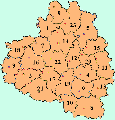 Tula Oblast map by Al Silonov Карта районов Тульской области